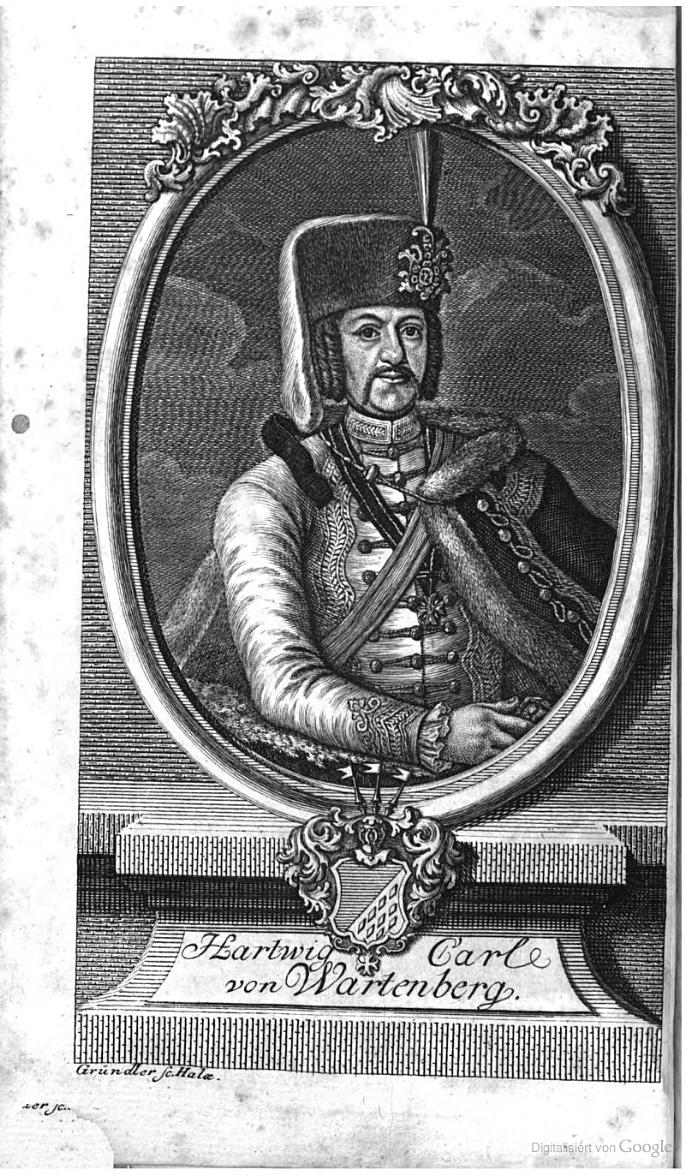 Hartwig Carl von Wartenberg, 03.04.1711 in Uentze (Prignitz), gefallen 2.5.1757 bei Alt-Bunzlau, Chef des Husaren Regiments Nr. 3